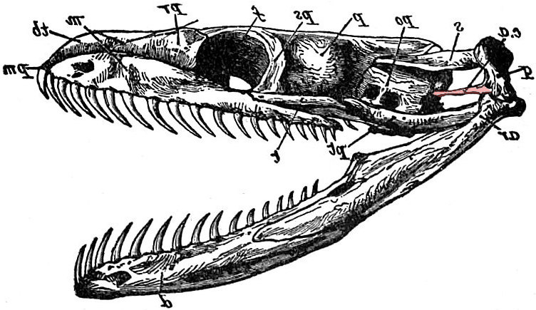 Columela auris marcada en rojo sobre el cráneo de una Python sebae. El archivo original sin el color es EB1911_Reptiles_-_Skull_of_Python_sebae.jpg , y es de la Enciclopedia británica (1911)